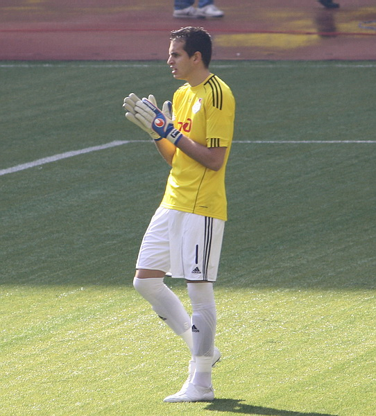 Guilherme Alvim Marinato